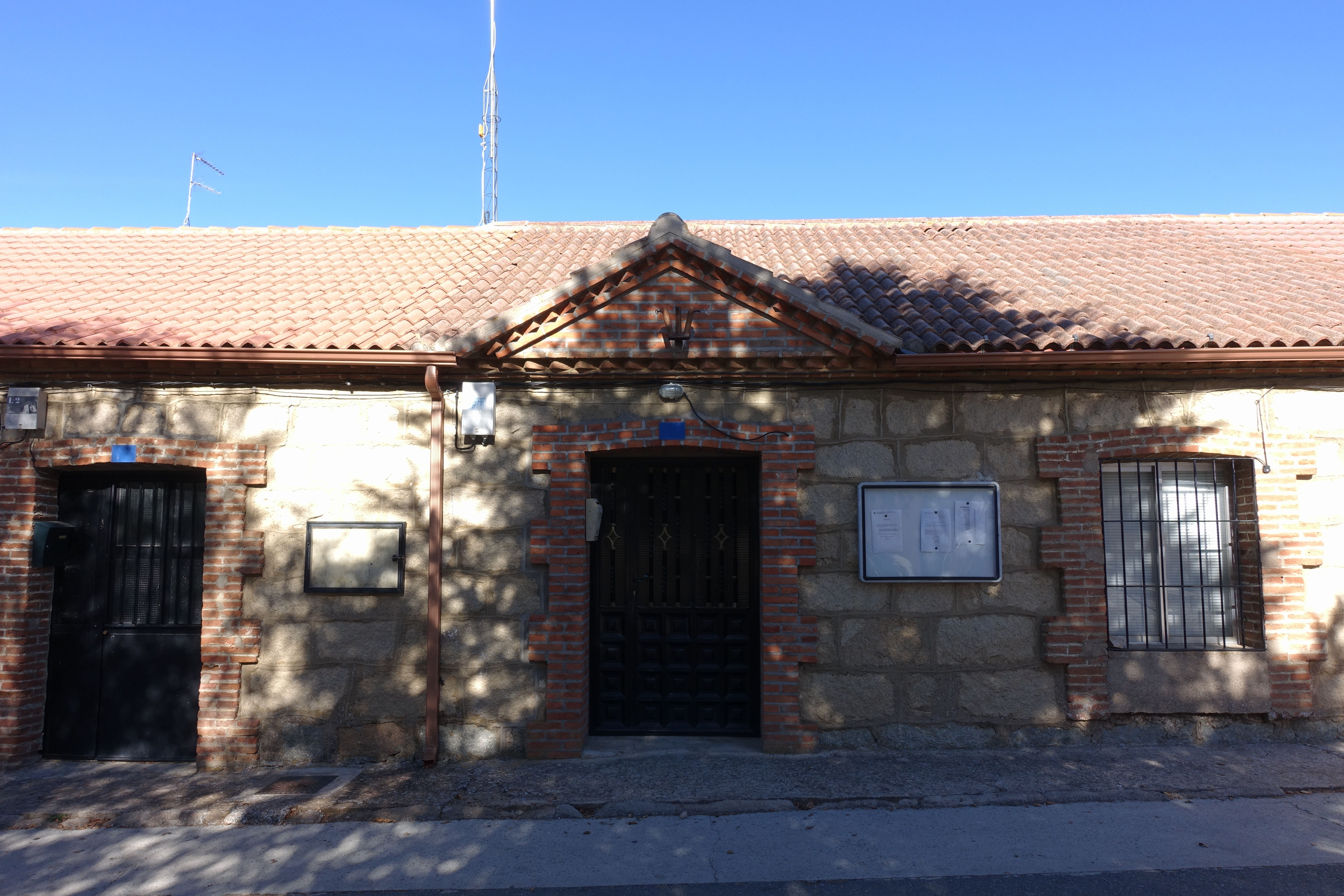 Casa consistorial de Mediana de Voltoya (Ávila, España).